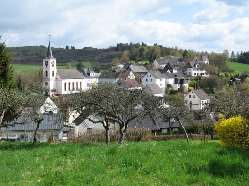 Schalkenmehrener Ortskern Andrea Heck, April 2006